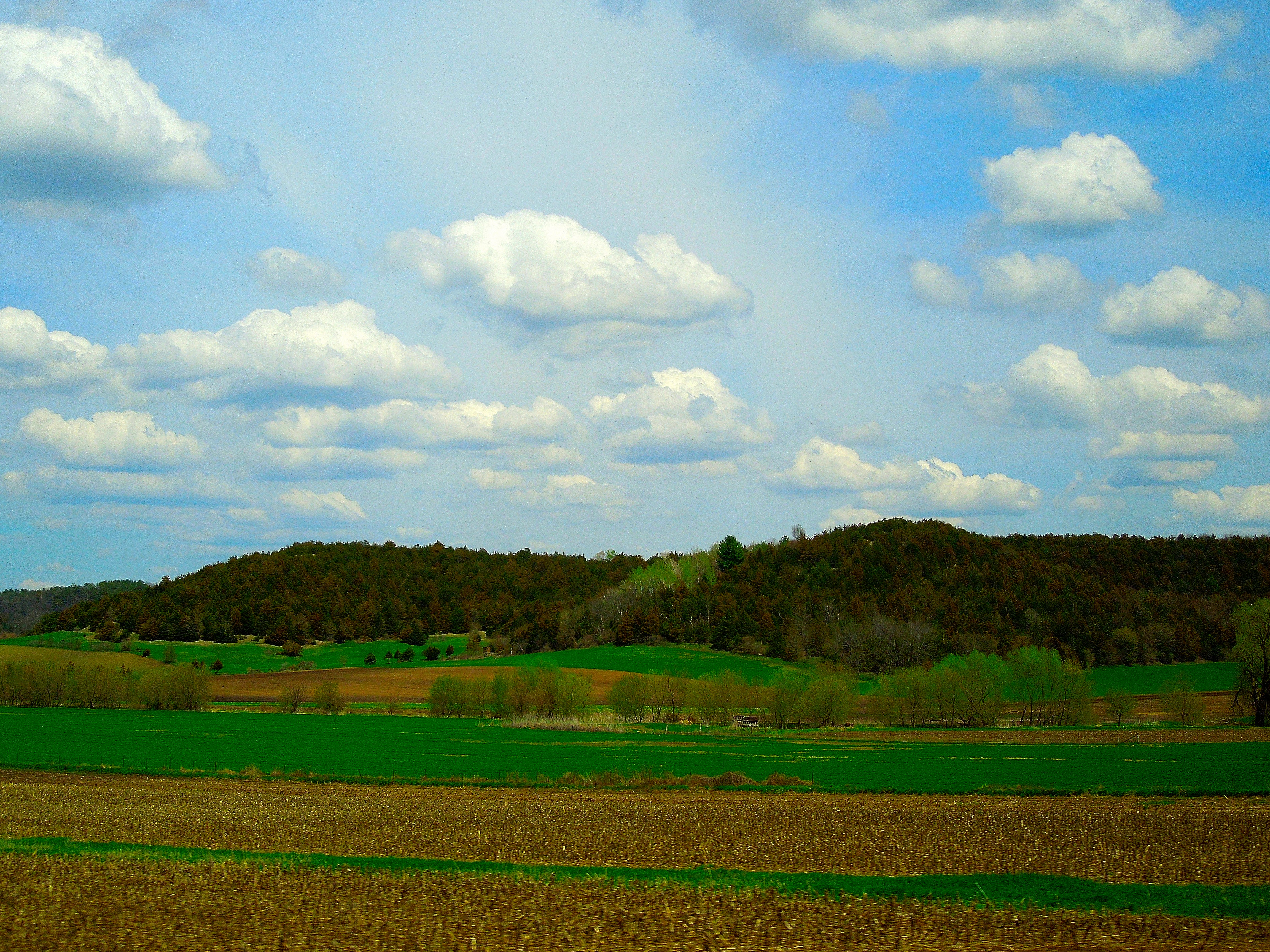 Driftless Area